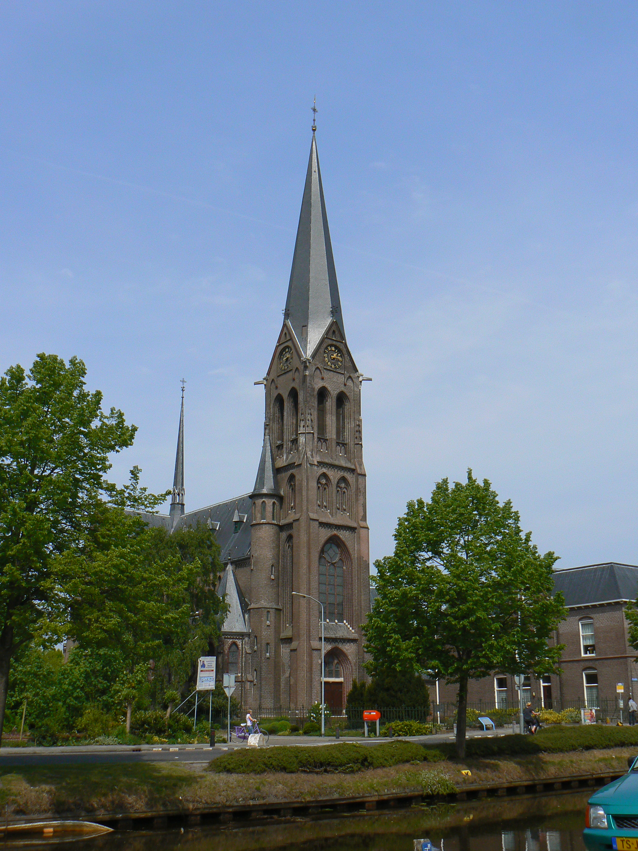 Sint-Willibrorduskerk met pastorie, F. Clockstraat 228 in Oude Pekela/The Netherlands